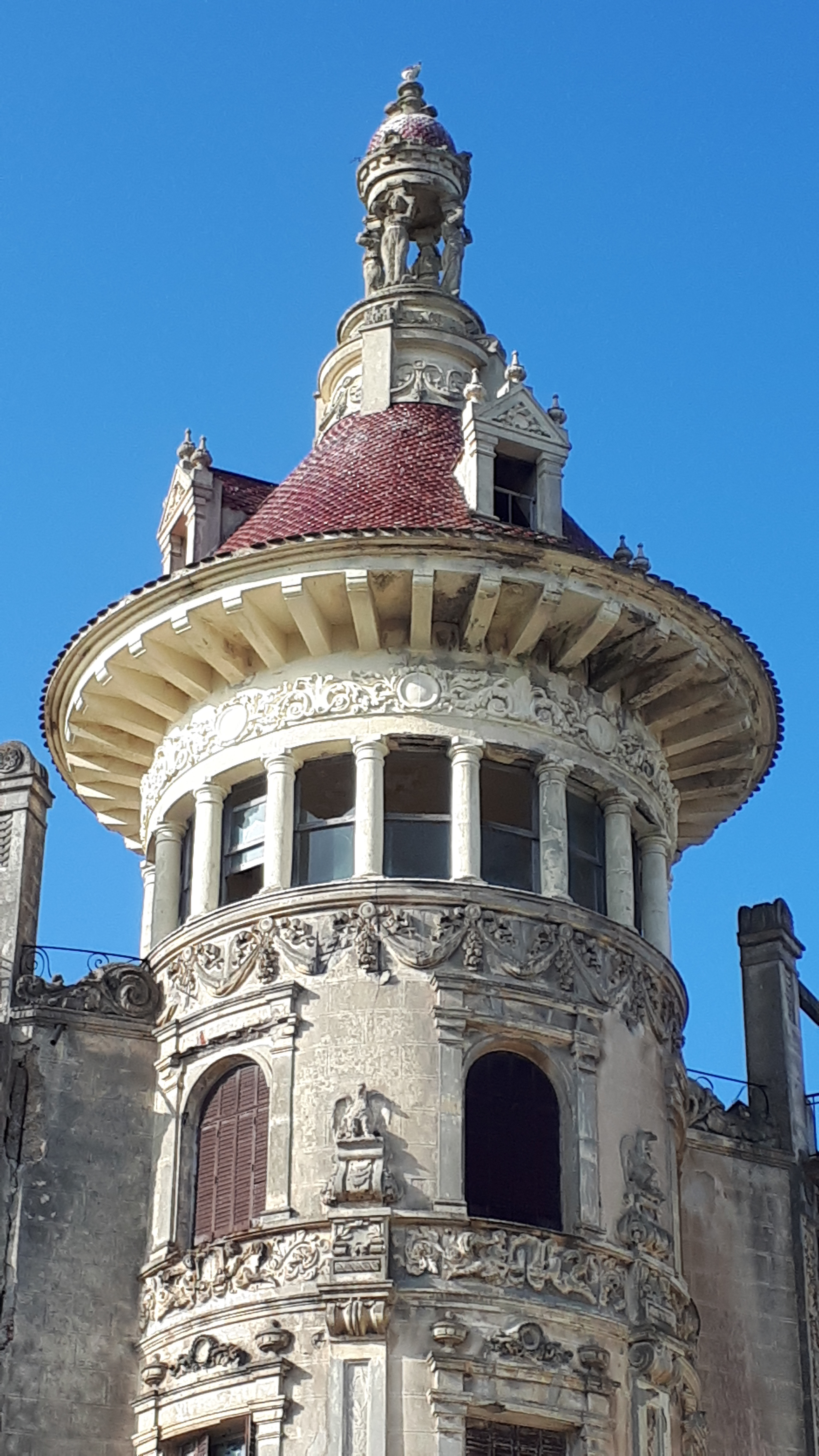 Detalle de la Torre de los Moreno en Ribadeo (Provincia de Lugo - España).